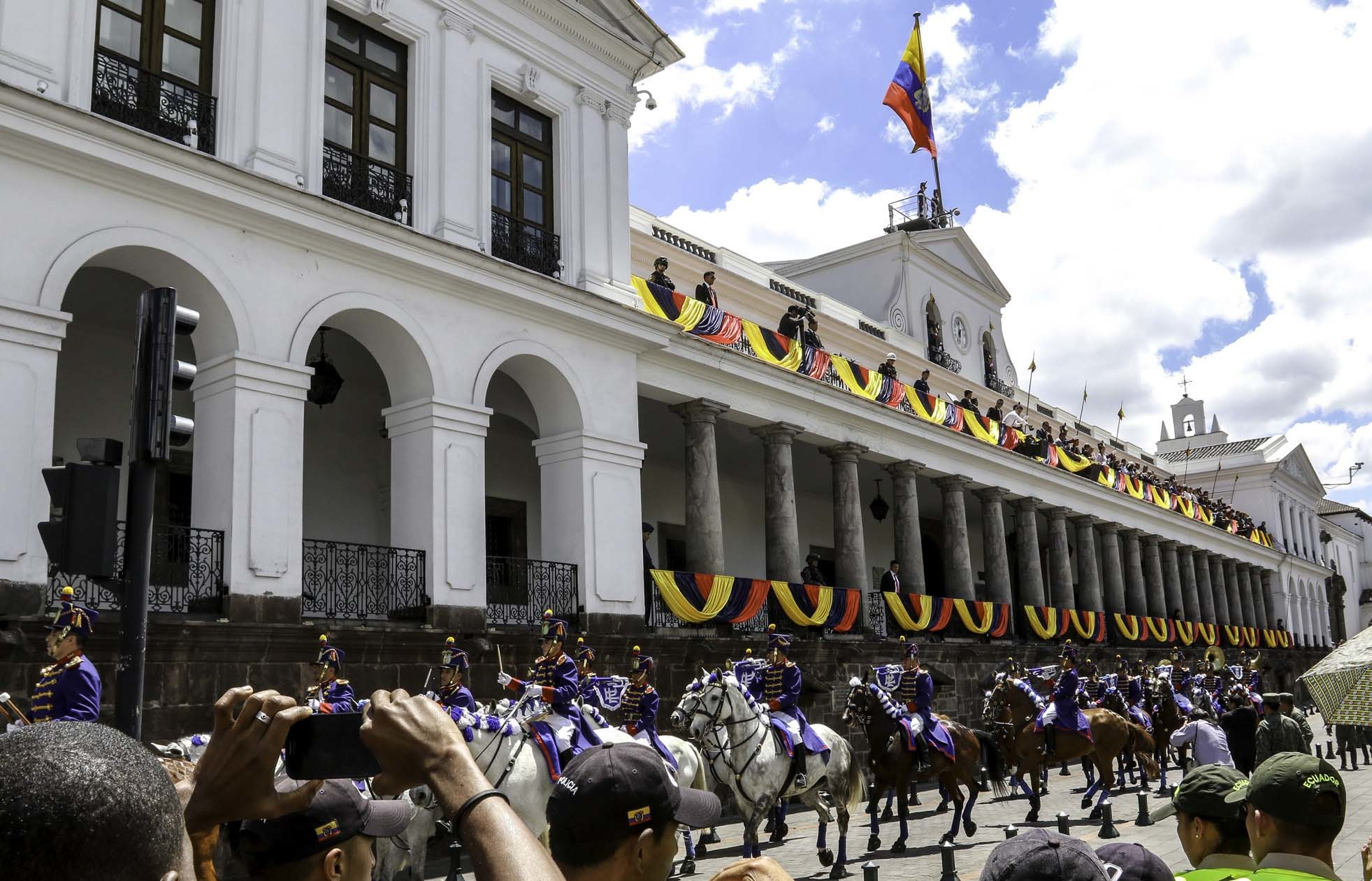 Quito, 10 ago (Andes).- Con la presencia del presidente de la República, Rafael Correa; el vicepresidente Jorge Glas, varios ministros de Estado e invitados se realizó este lunes el Cambio de Guardia dedicado a los héroes del primer Grito de Independencia, d el 10 de agosto de 1809. ANDES/Micaela Ayala V.